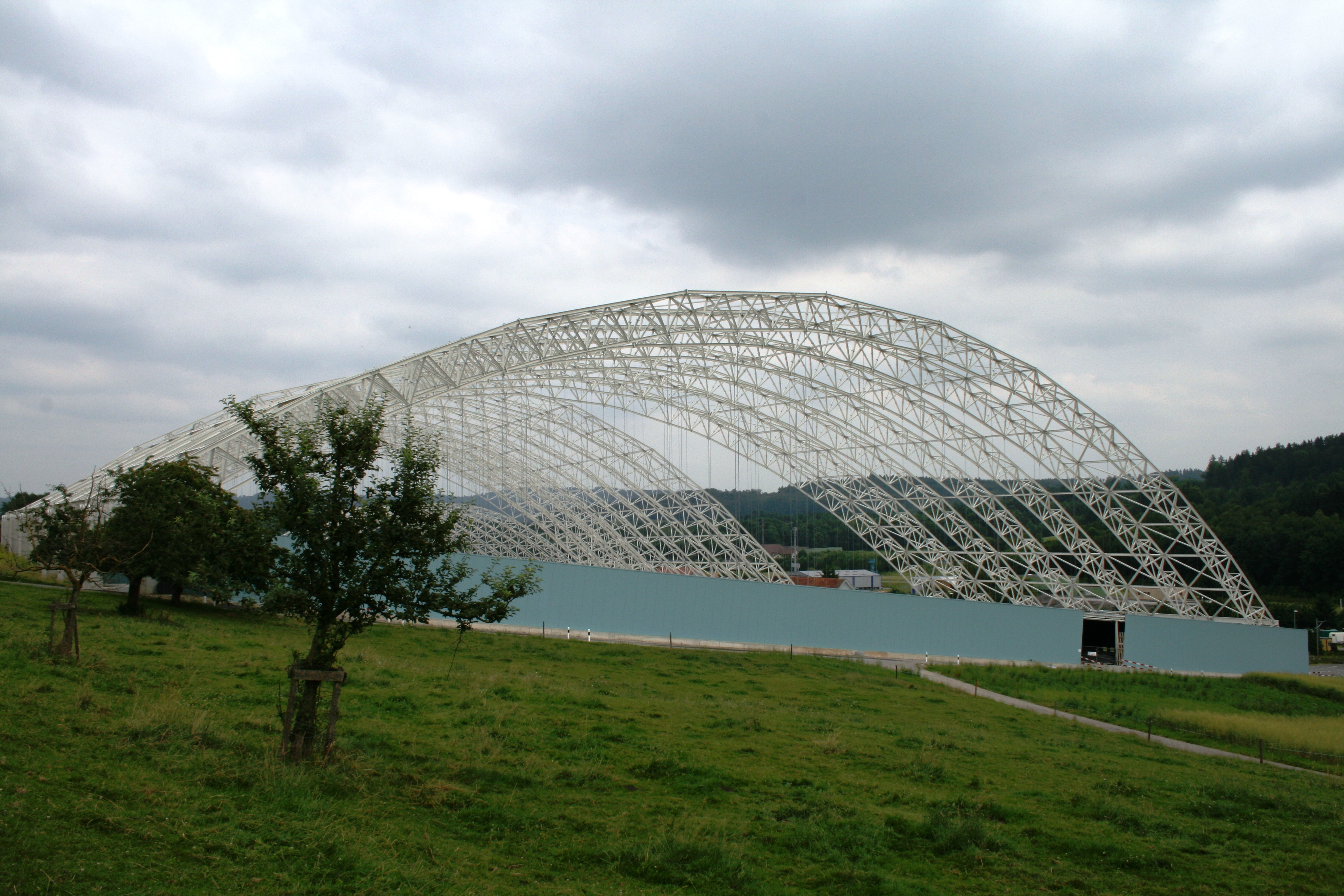 Sondermülldeponie Kölliken AG, Schweiz